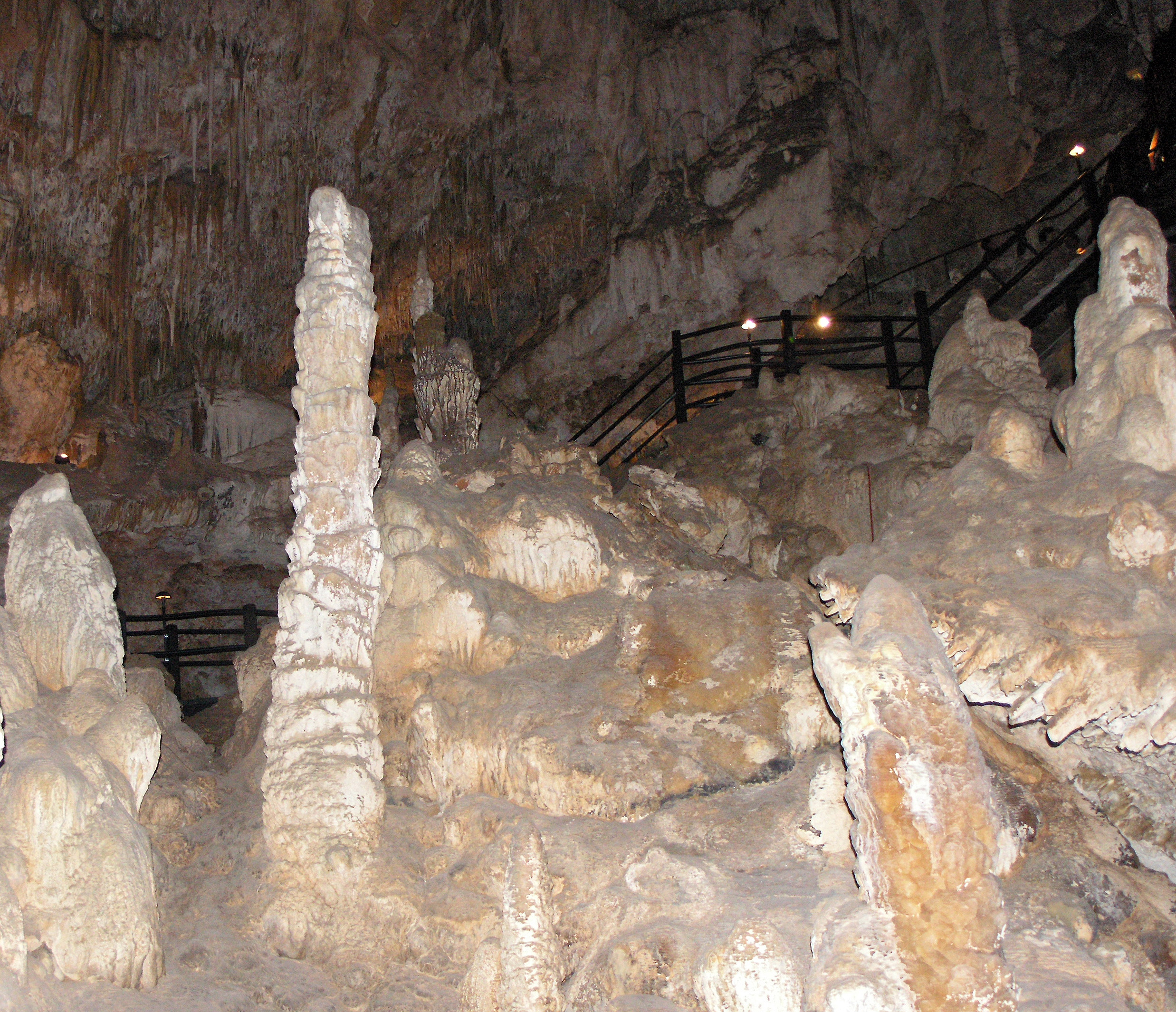 Ngilgi Cave